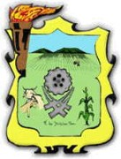 Escudo de Armas de Mendez Tamaulipas